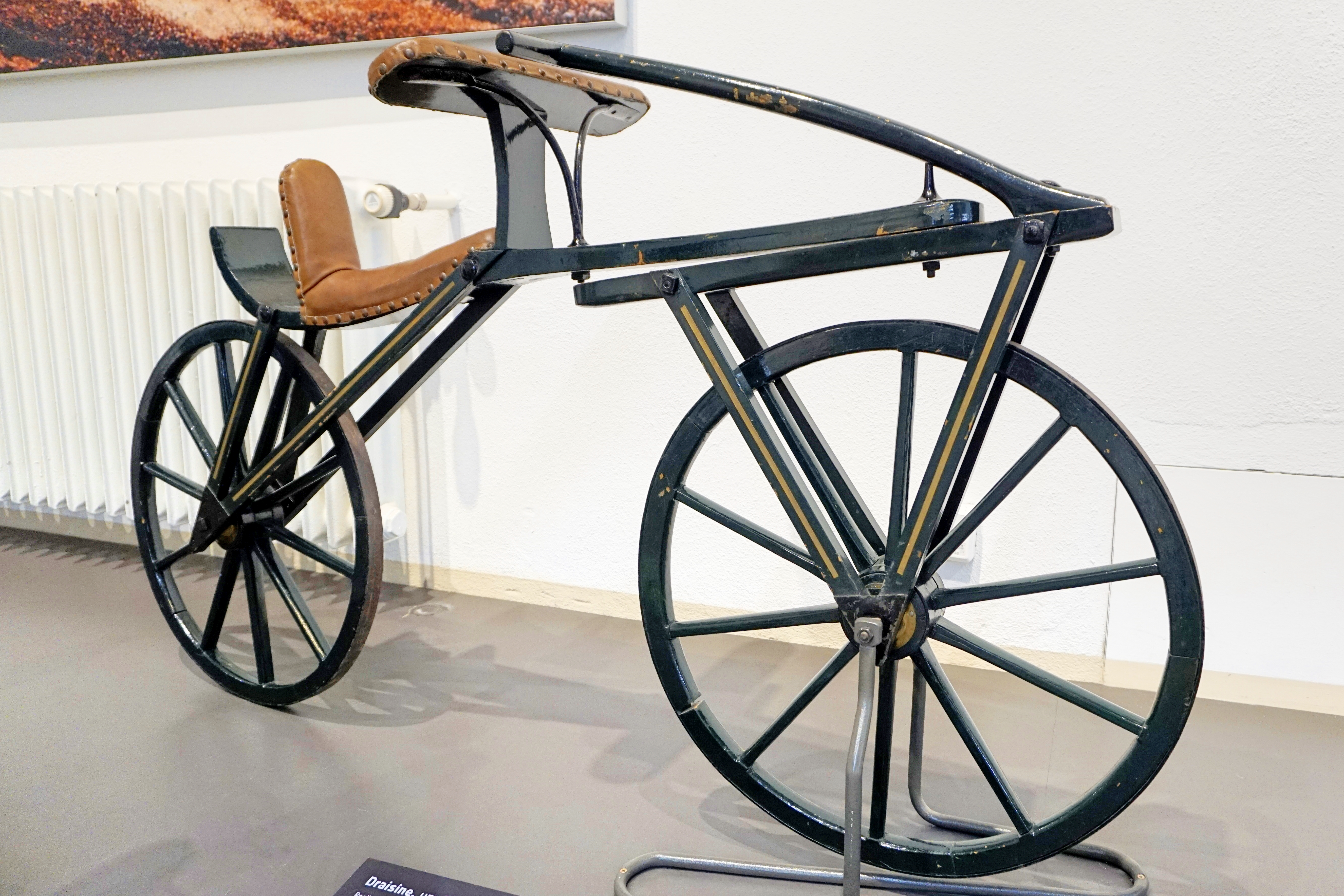 Draisine, Replika um 1818 Maße (L/B/H): 1.650/470/910 mm Eigengewicht: ca. 15 kg Radgröße: 24""